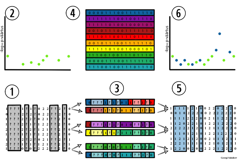 Põhineb Jonathan Marchini ja Bryan Howie artiklil juulist 2010: Genotype imputation for genome-wide association studies. Nature Reviews Genetics 11, 499–511.